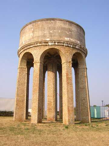 Chateau d'eau Américain de Saint-Parize-Le-Chatel